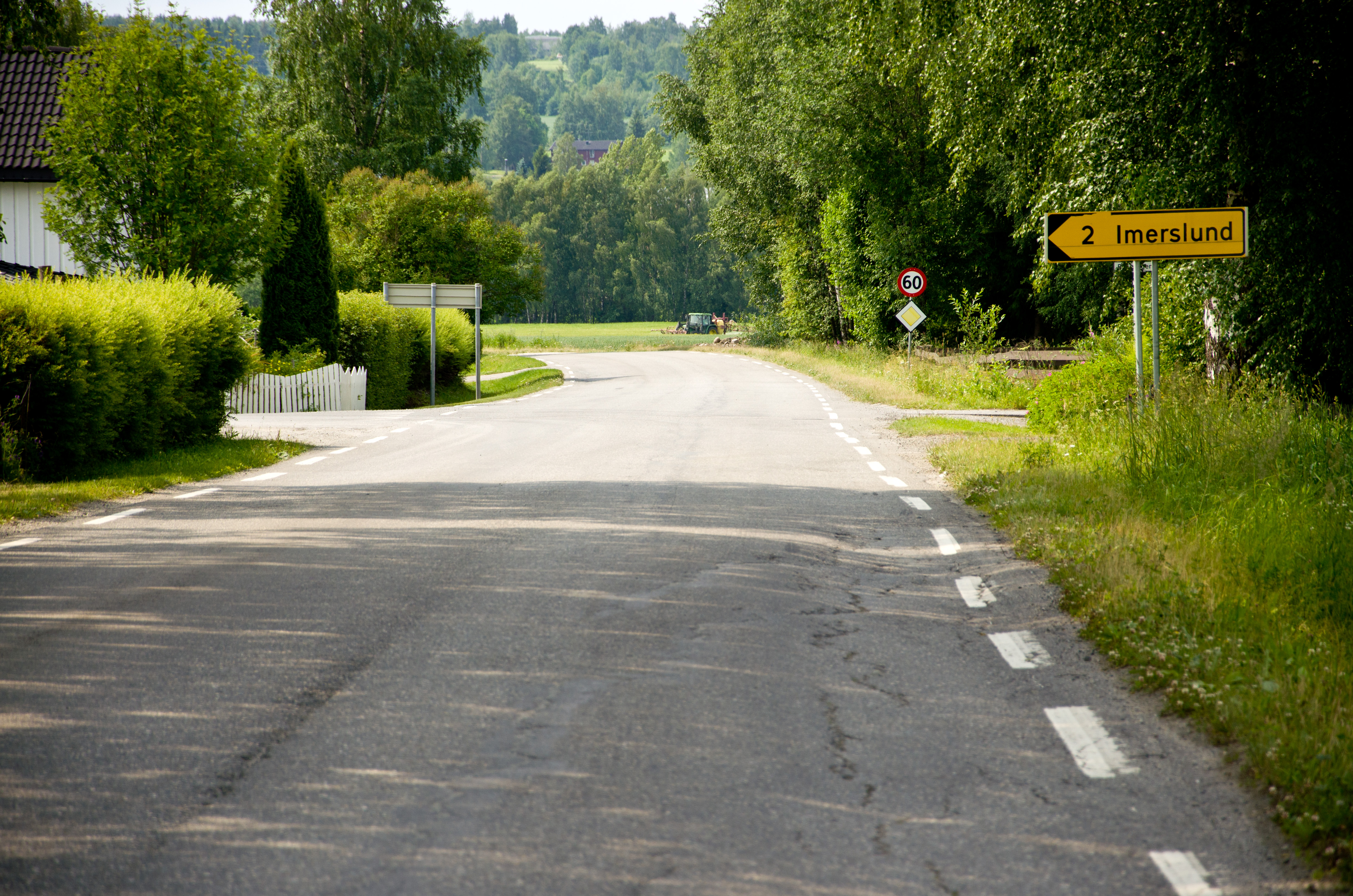 Fylkesvei 1794 (tidl. 102) Narmoegen i Hamar